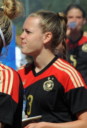 a_132_7666